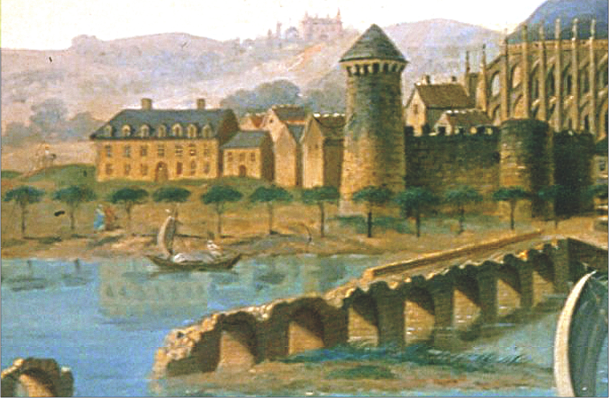 Le Logis des Gouverneurs et le château de Tours déjà bien endommagé. Au premier plan le pont d'Eudes en cours de démolition. Détail d'un tableau offrant une vue panoramique de Tours, de Charles-Pierre-Antoine DEMACHY (Musée des Beaux-Arts de Tours) vers 1786